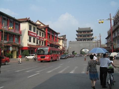 Shenyang Da dong men